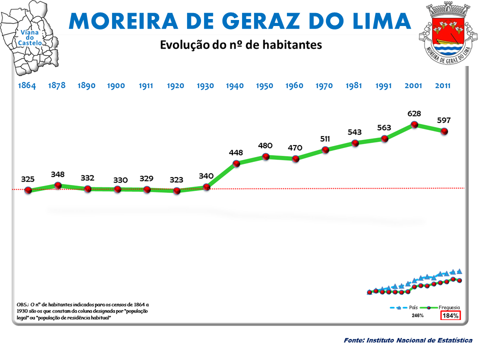 Censos 1864/2011